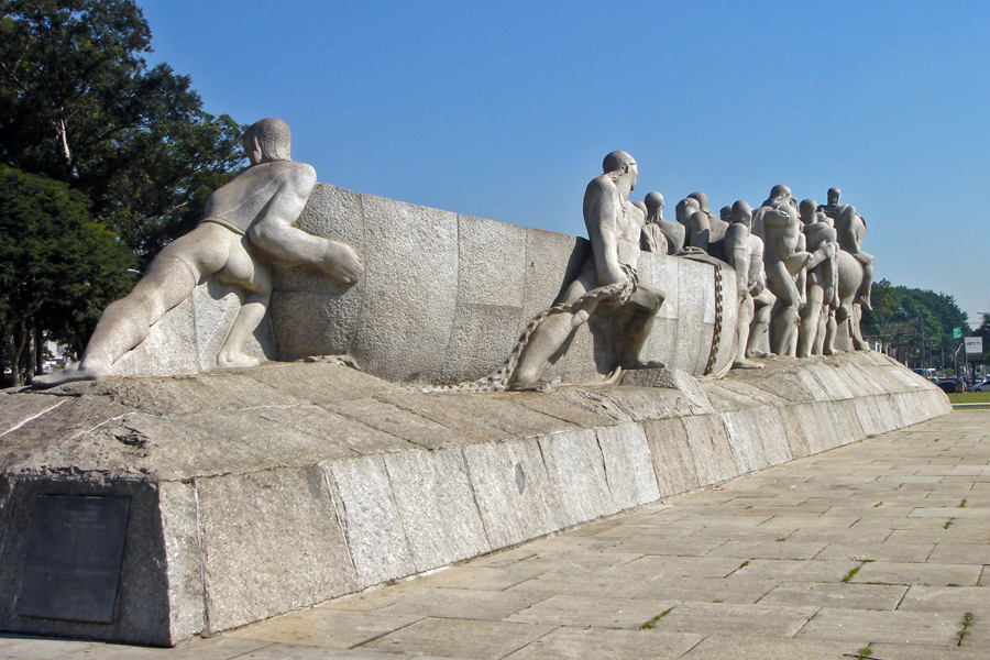 Monumento às Bandeiras, São Paulo, Brazil